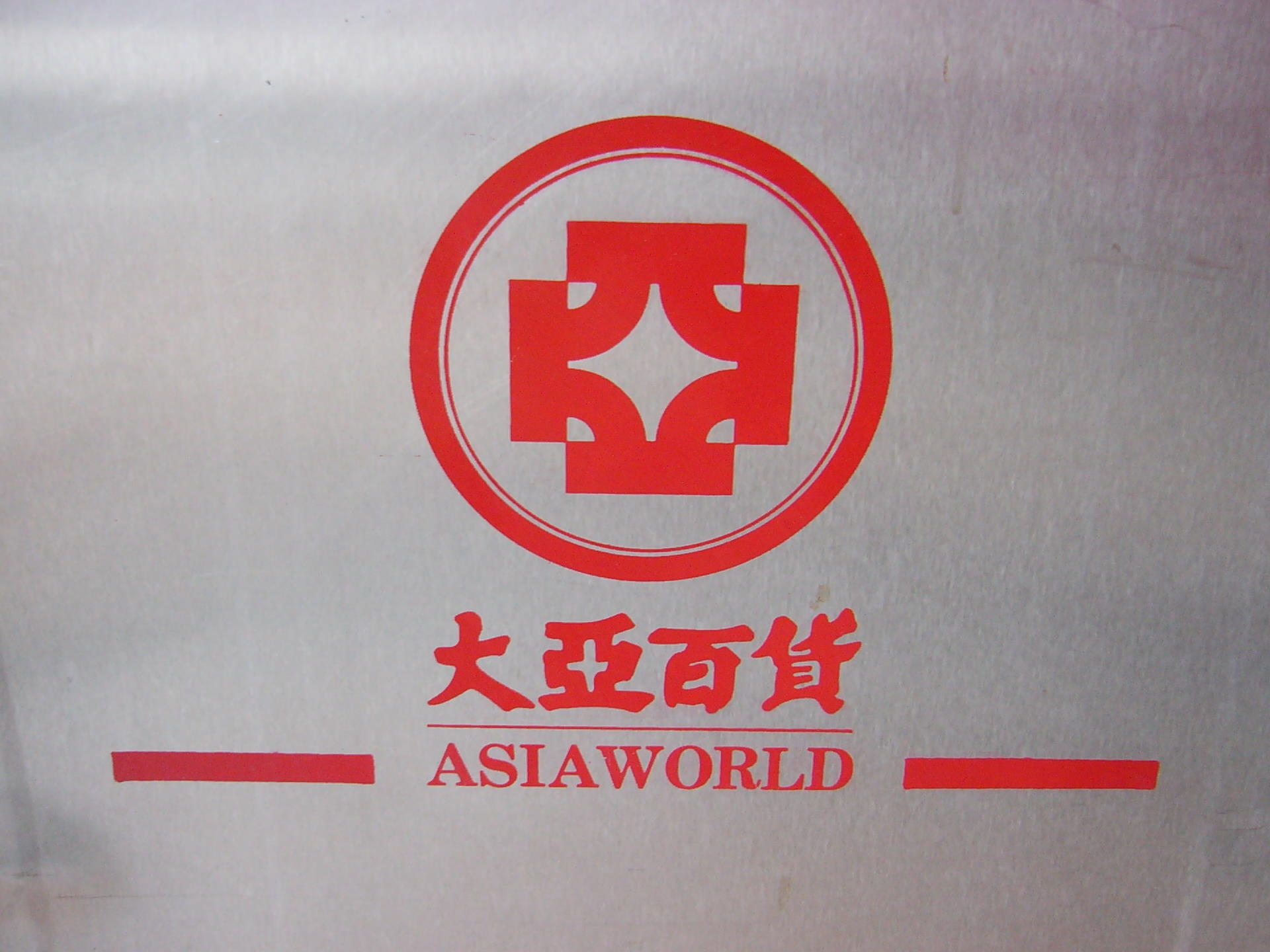 亞洲廣場大樓1樓大廳不鏽鋼垃圾桶正面殘存的大亞百貨商標。